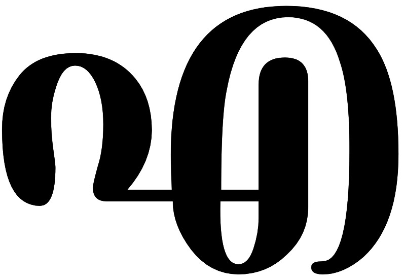 എ അക്ഷരം